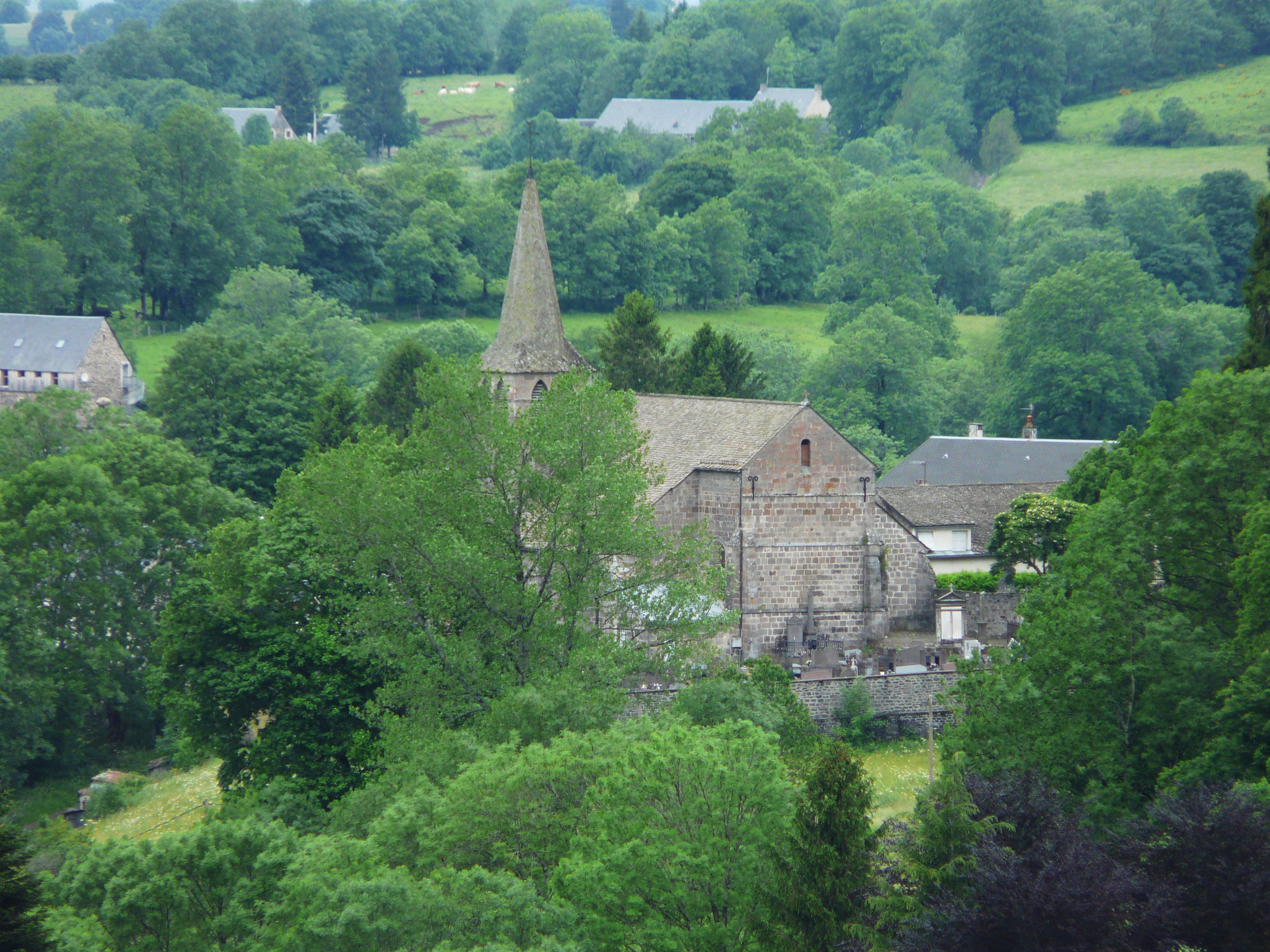 L'église Saint-Pardoux dans son village, La Tour-d'Auvergne, Puy-de-Dôme, France.